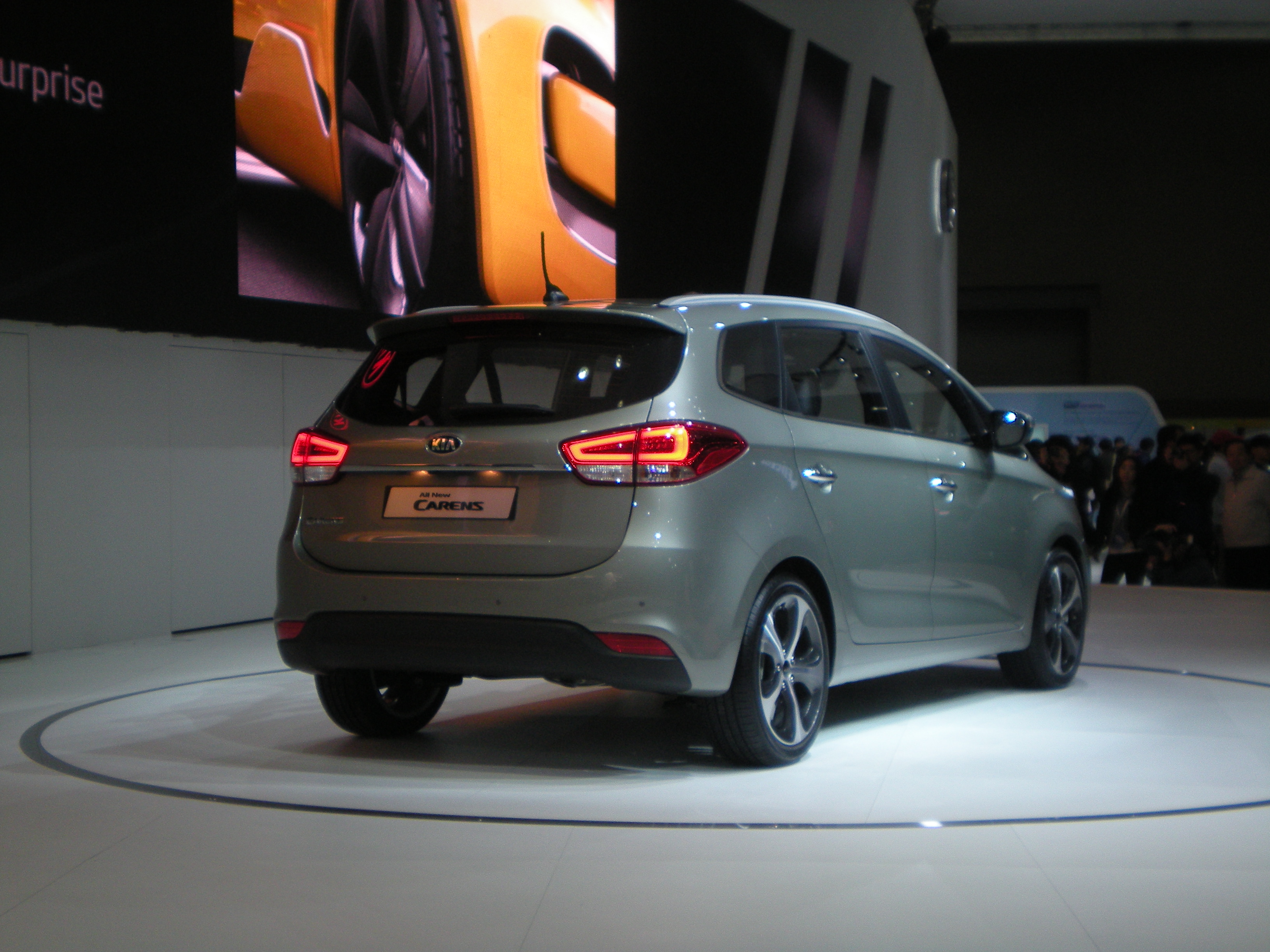 キア・カレンス